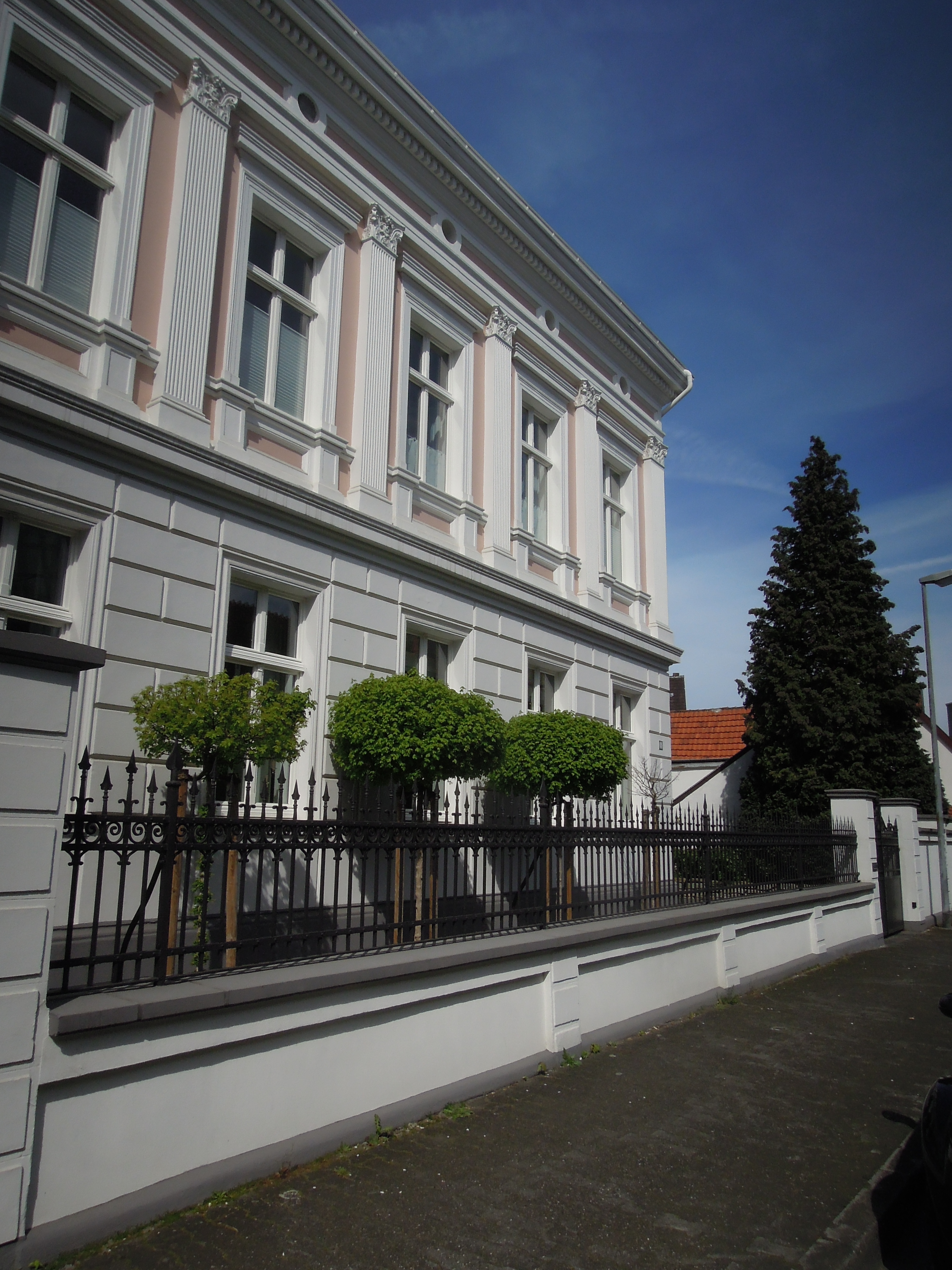 Stolpersteinlage Soest Hoher Weg 8